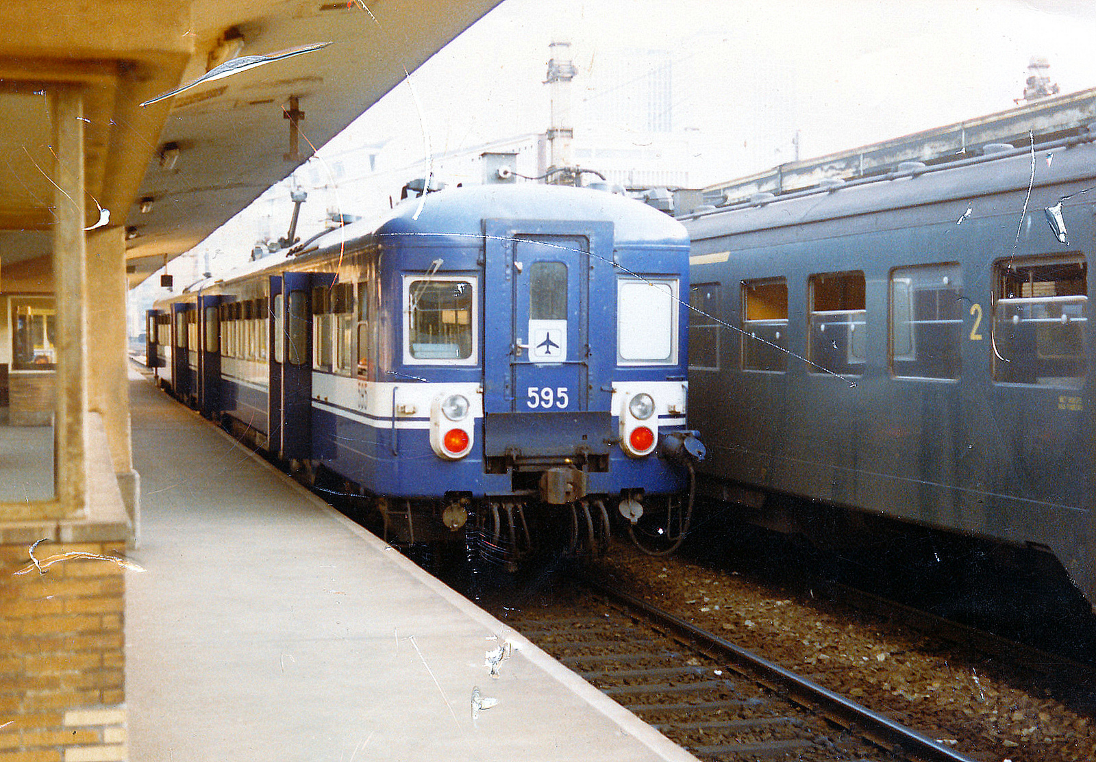 Een Klassiek Motorstel in de kleuren van Sabena. Deze stellen zijn in 1970 gebouwd om te gebruiken op de toen pas geëlektrificeerde lijn Brussel – Luchthaven Brussels Airport.